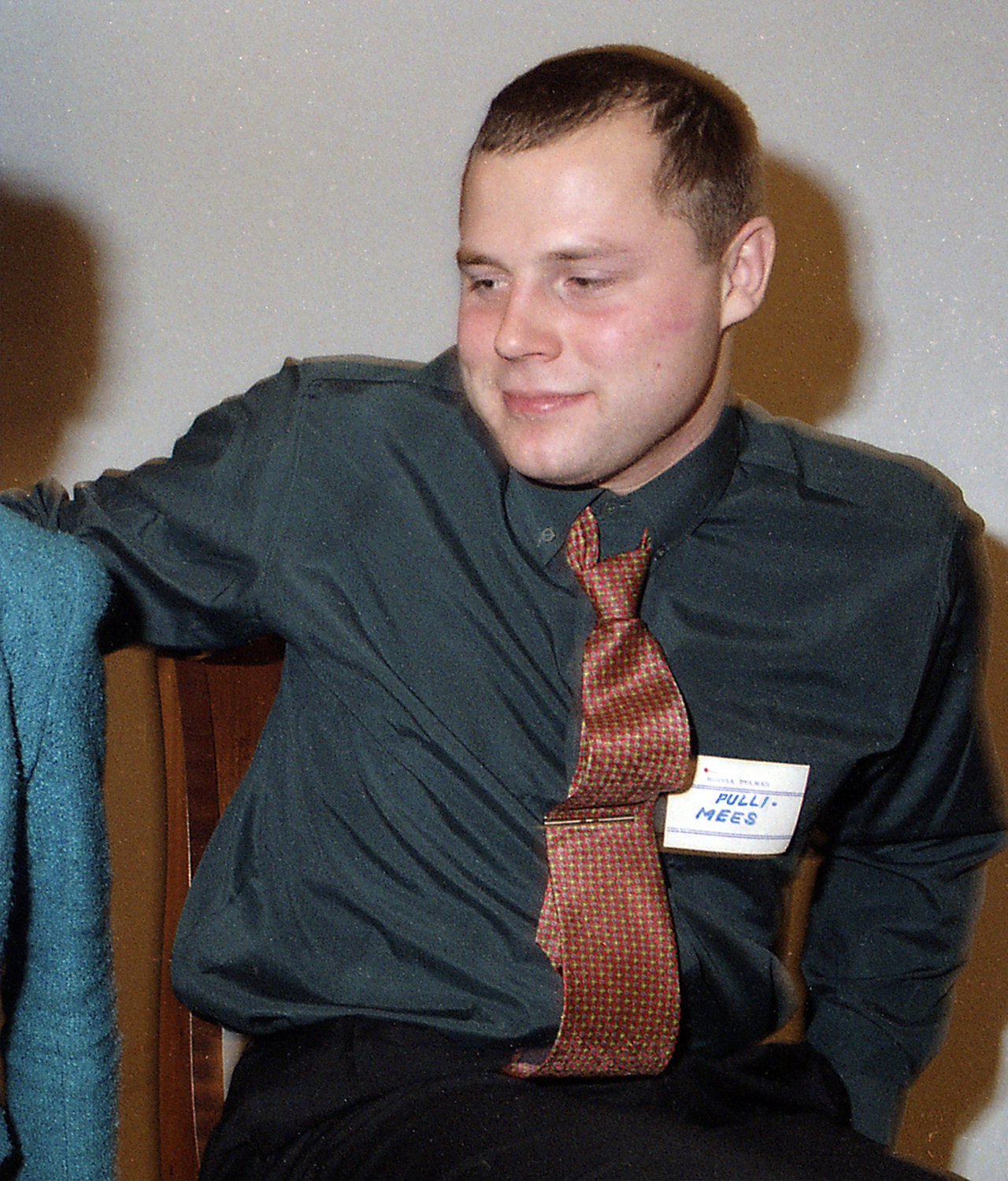 Arlet Palmiste, laulja ja meelelahutustegelane 97